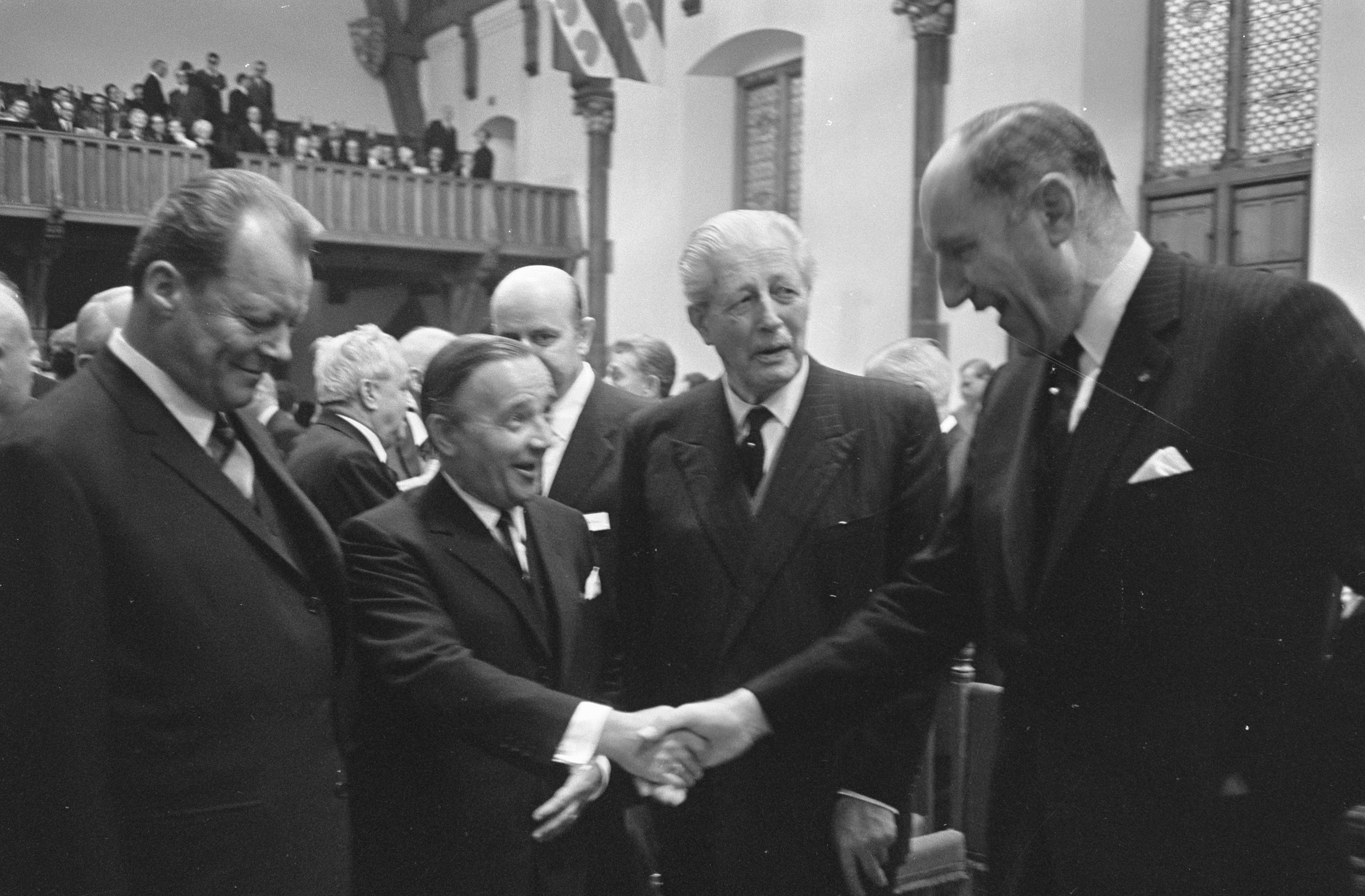 Collectie / Archief : Fotocollectie Anefo Reportage / Serie : [ onbekend ] Beschrijving : Congres Europese Beweging in Den Haag v.l.n.r. Ministe Willy Brandt , Premier de Jong , Macmillan en Minister Luns Datum : 8 november 1968 Locatie : Den Haag, Zuid-Holland Trefwoorden : BEWEGINGEN, congressen, ministers, premiers Persoonsnaam : Brandt, Willy, Luns, J.A.M.H., Luns, Joseph Fotograaf : Koch, Eric / Anefo Auteursrechthebbende : Nationaal Archief Materiaalsoort : Negatief (zwart/wit) Nummer archiefinventaris : bekijk toegang 2.24.01.05 Bestanddeelnummer : 921-8375